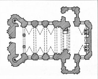 план касцёла Св. Андрэя